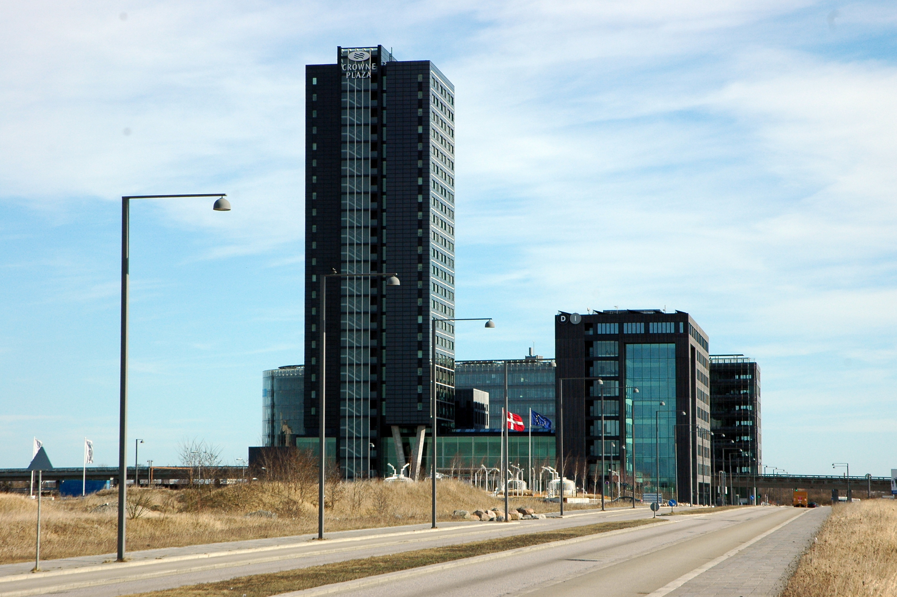 Crowne Plaza Copenhagen Towers. Opened 2009